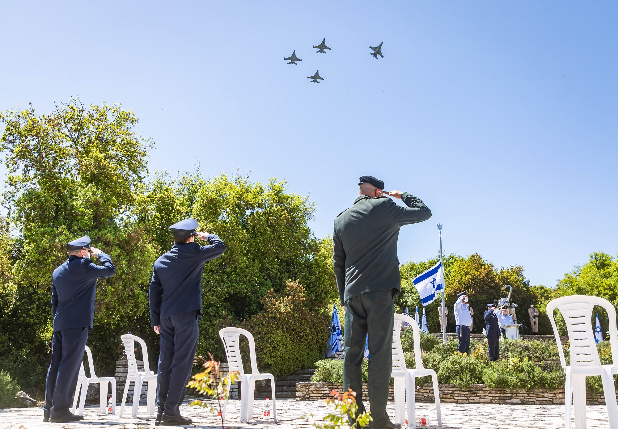 טקס יום הזיכרון לחללי חיל האוויר בהר הטייסים.